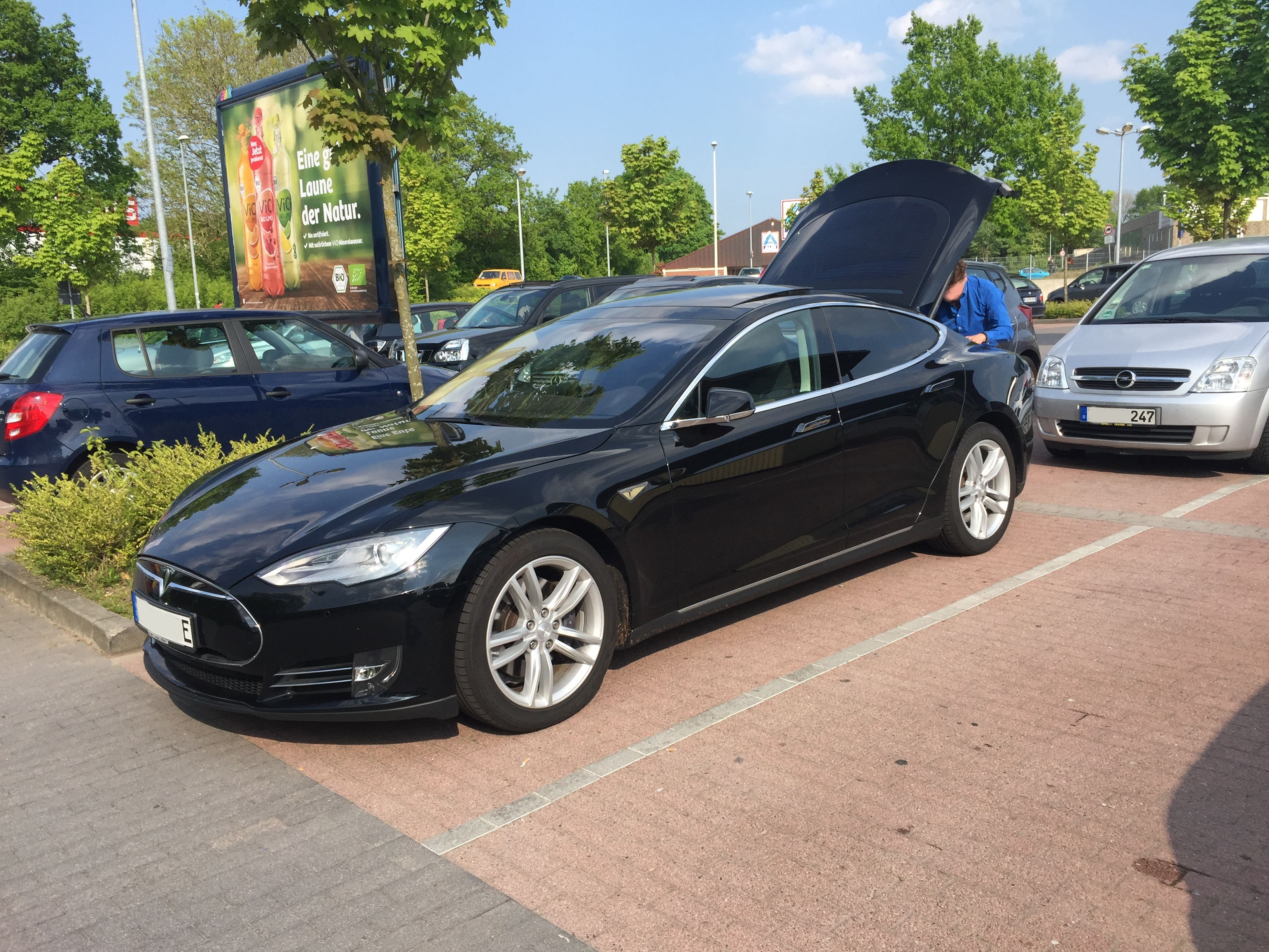 Tesla Model S mit geöffneter Heckklappe